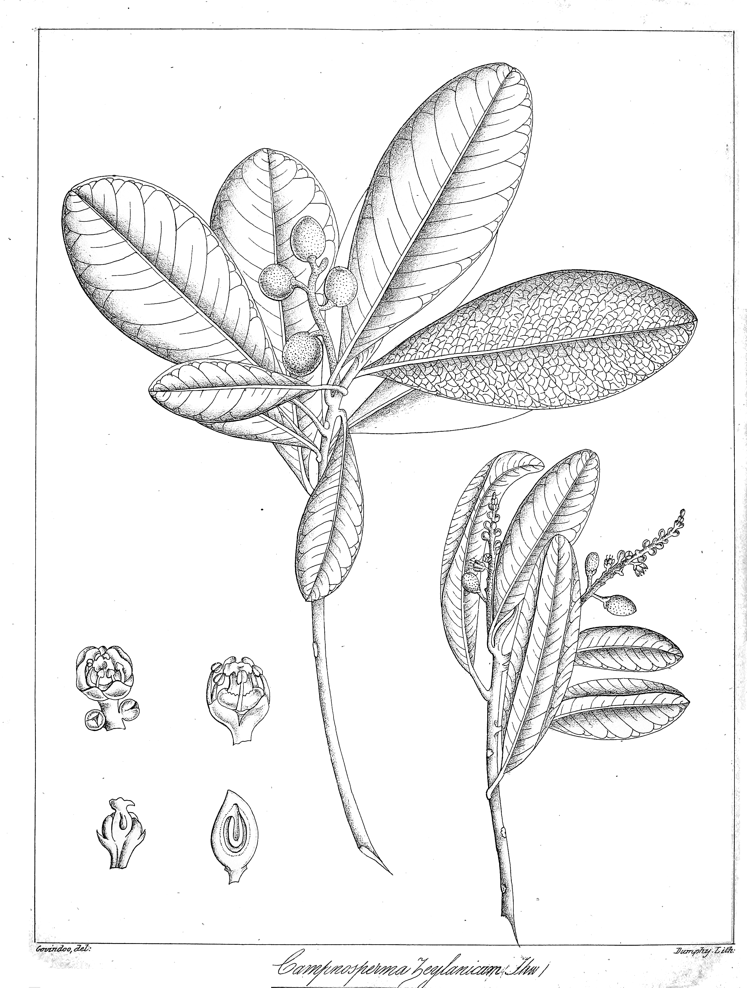 Campnosperma zeylanicum